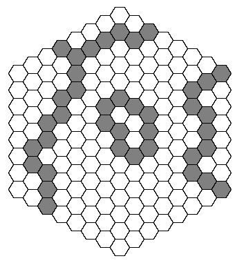 copie de